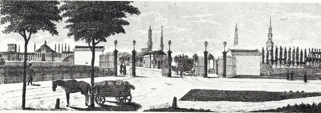 Lübecker Thor in Hamburg um 1825